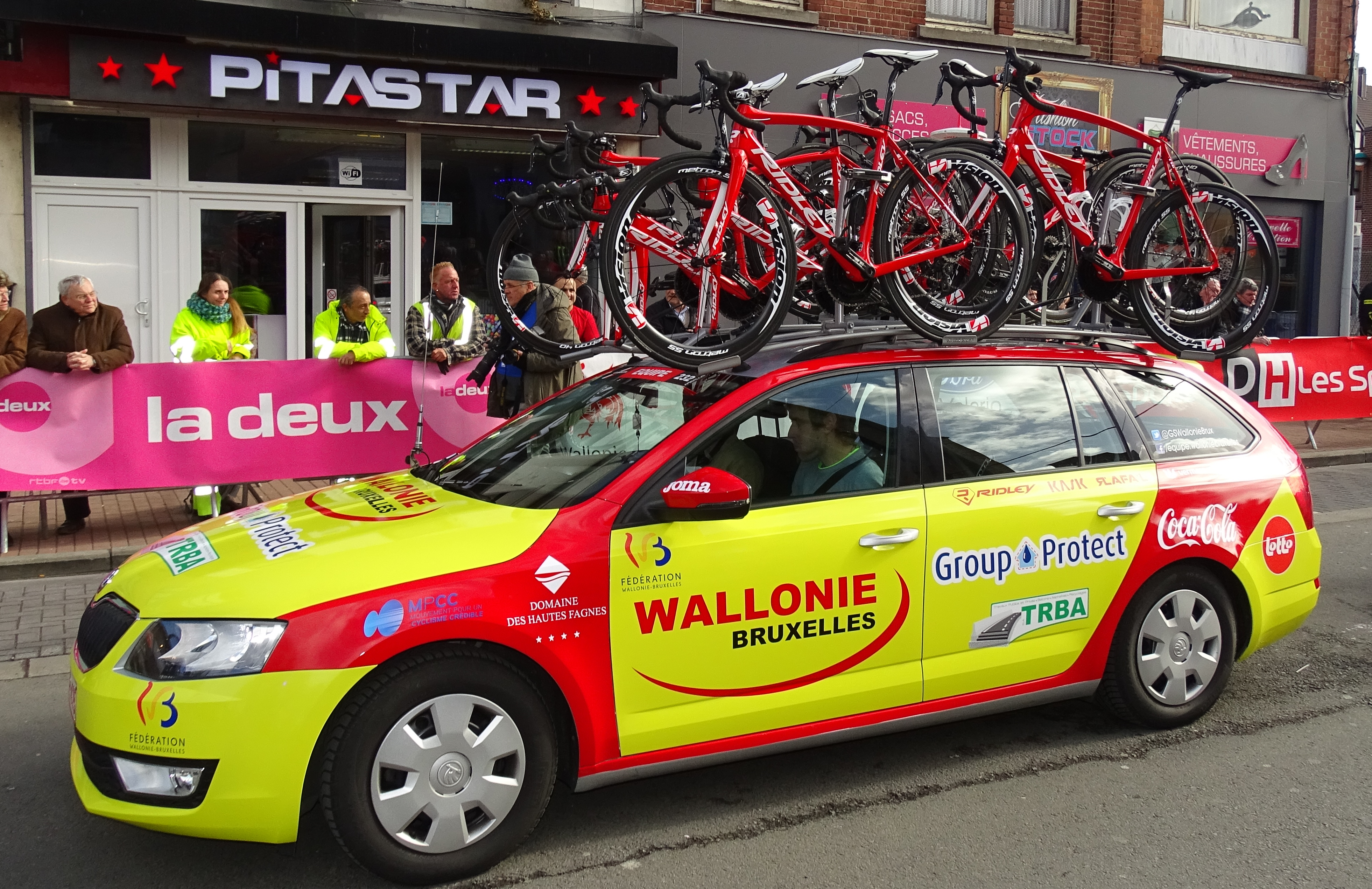 Reportage réalisé le mercredi 2 mars à l'occasion du départ du Samyn des Dames 2016 et du Samyn 2016 à Quaregnon, Belgique.